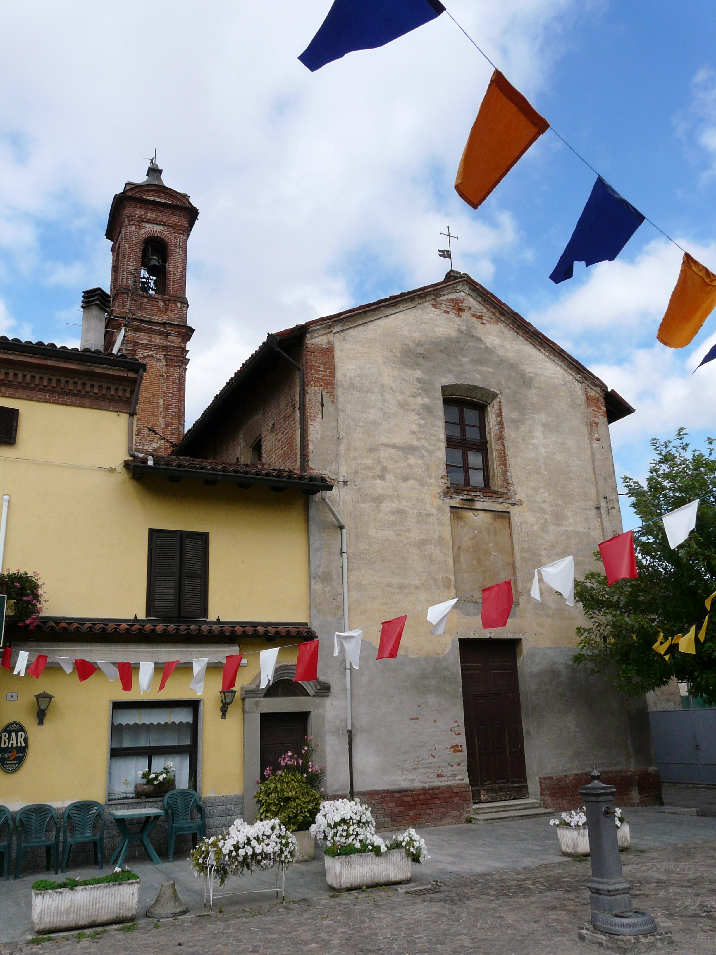 Oratorio di Castelspina, Piemonte, Italia